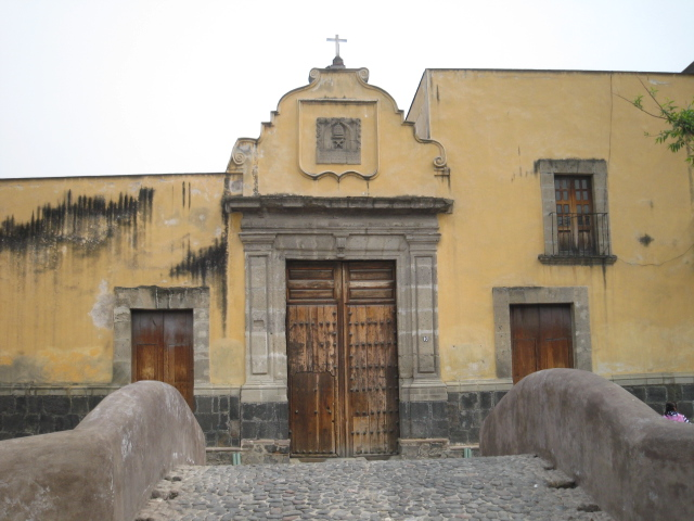 Antigua Alhondiga construida a finales del siglo XVII en la Ciudad de México, vista desde el puente del Canal de Roldán